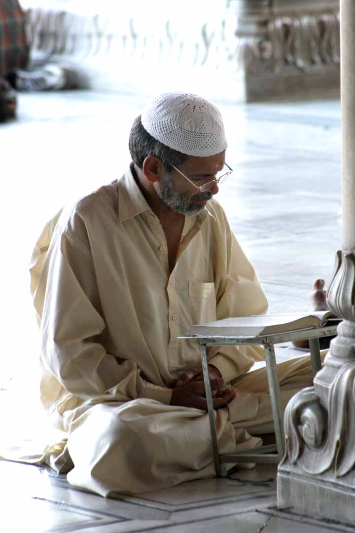 Muslim man at Ramadan. Photograph taken in India.